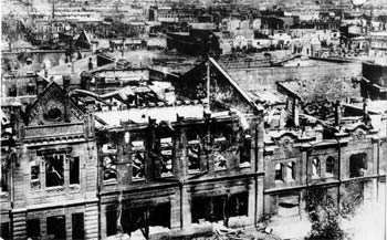 Пожар в Барнауле